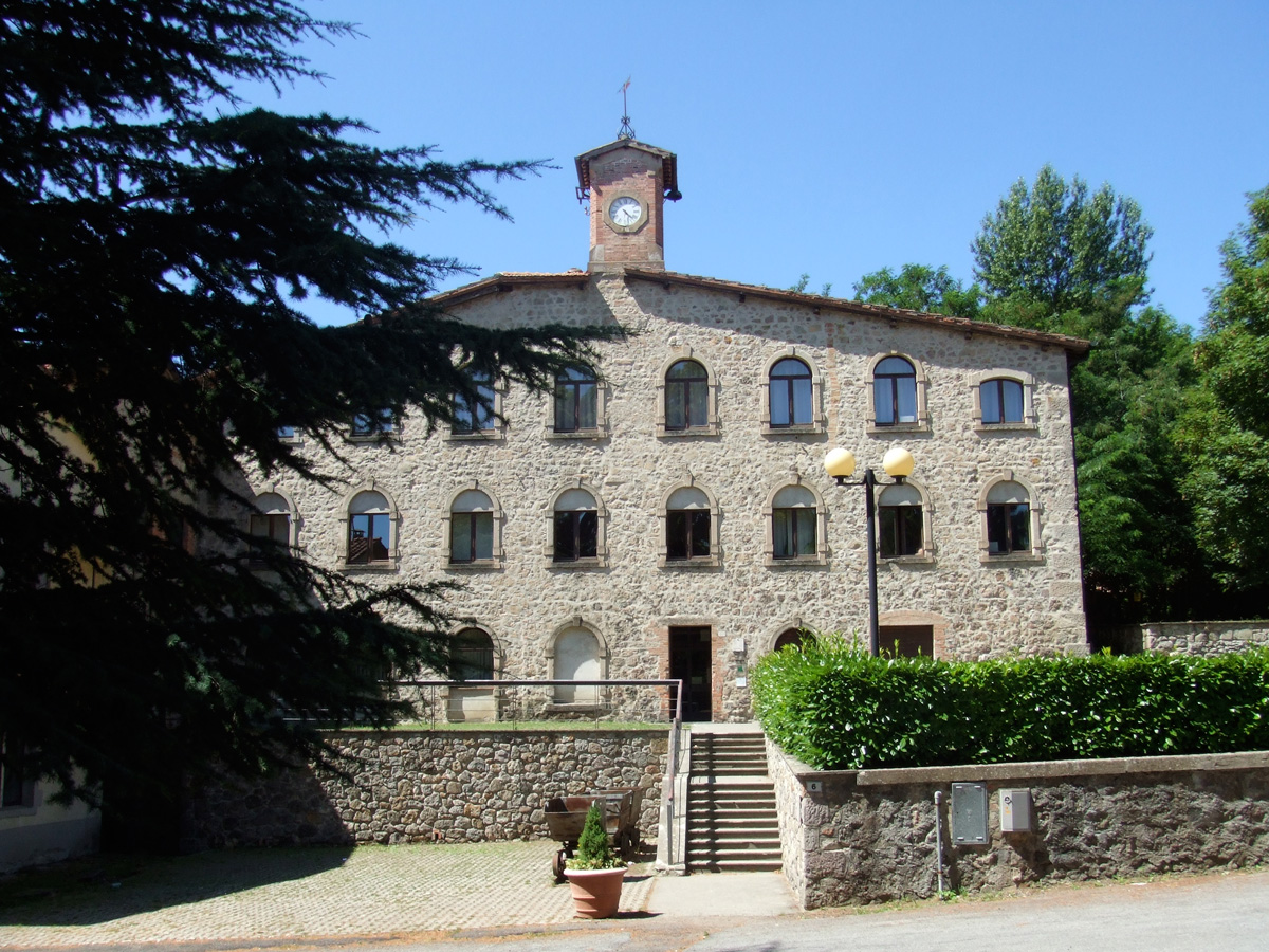 Pavillon de l'horloge, siège actuel du musée de la mine d'Abbadia San Salvatore (Toscane)